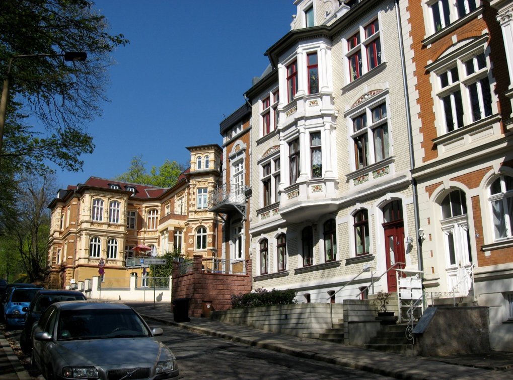 Nordhausen am Harz, Geiersberg am Gehege.